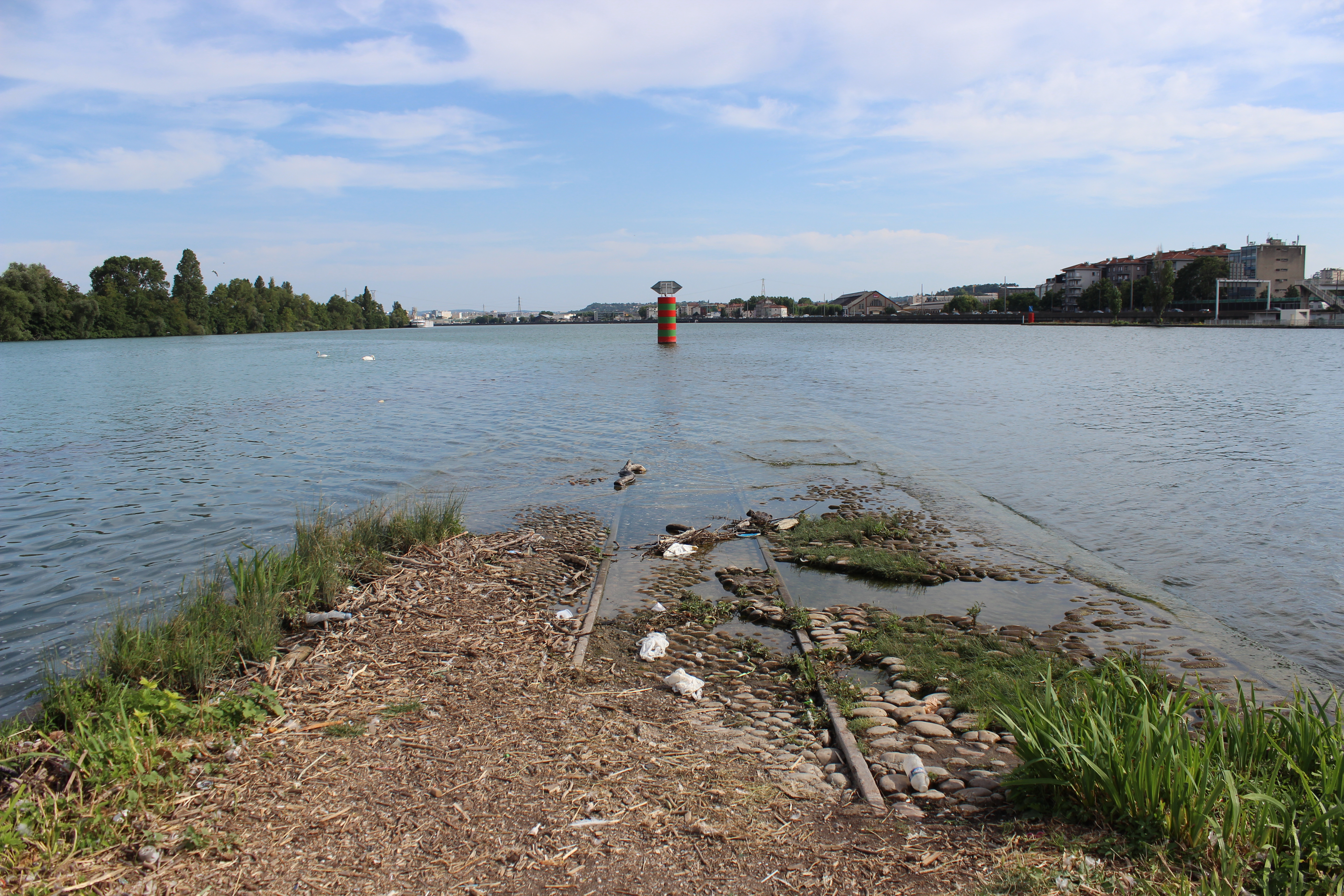 La pointe de la presqu'île à Lyon.